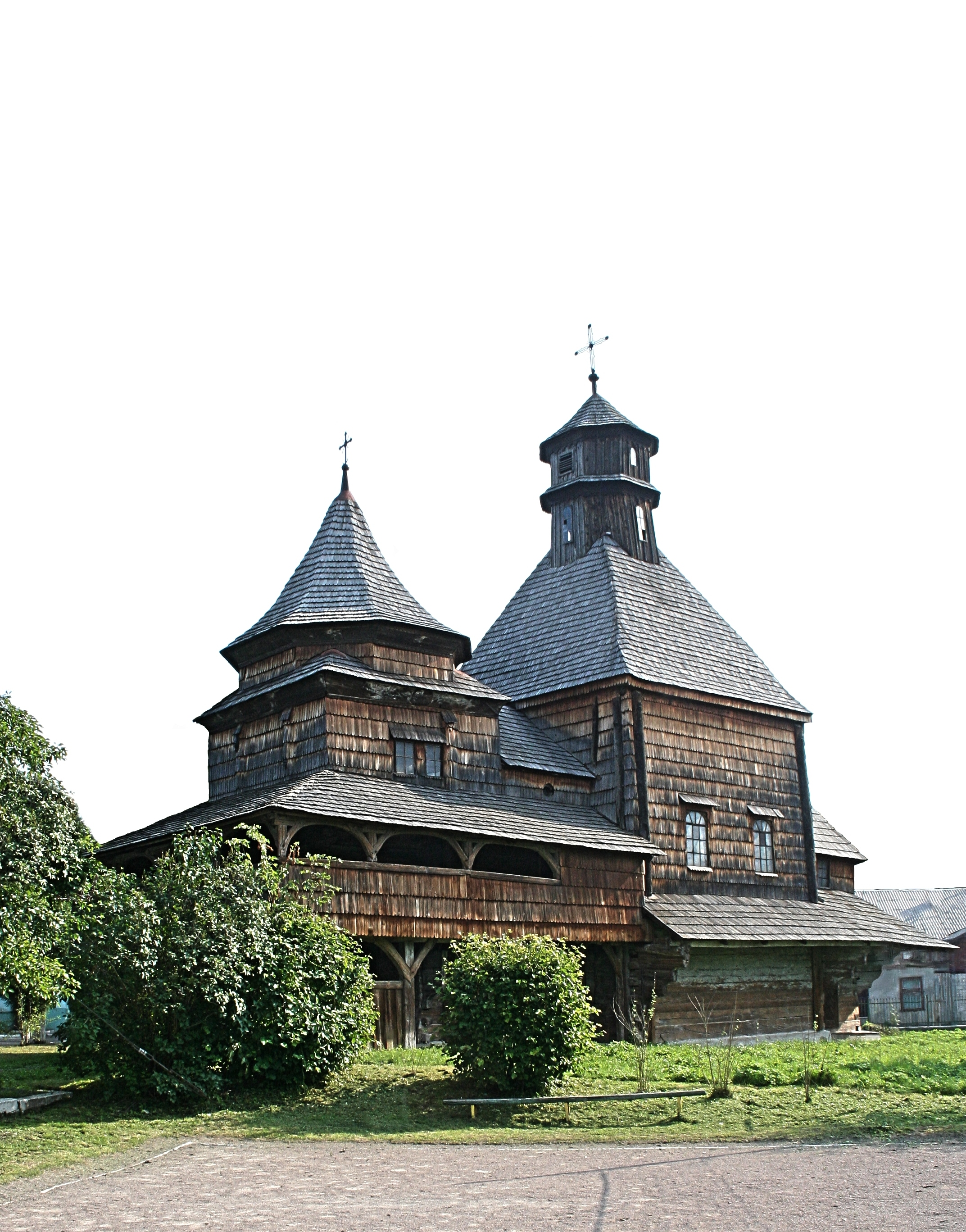 Україна Львівщина мiсто Дрогобич, Церква Чесного Хреста XVI ст. (4)